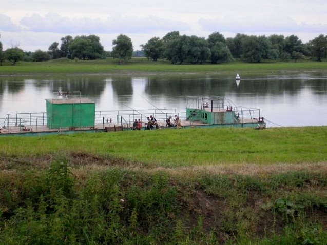 Рыбаки на дебаркадере пристани Междуречье